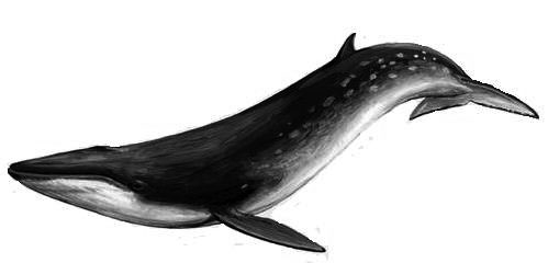 Rorcual tropical (Balaenoptera edeni), también conocido como rorcual de Eden o rorcual enano